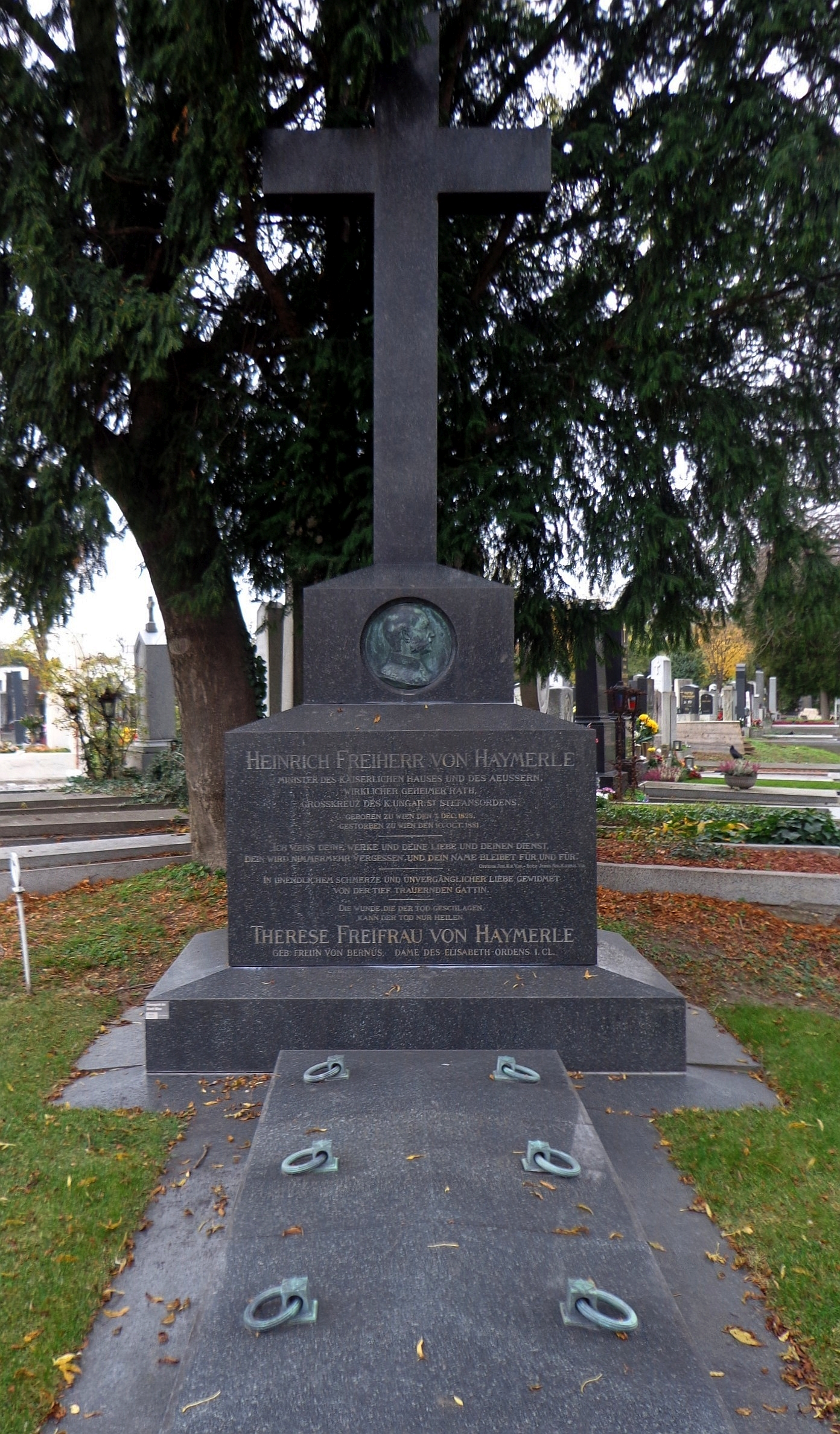 Wiener Zentralfriedhof - Gruppe 12E, Grab des Heinrich von Haymerle